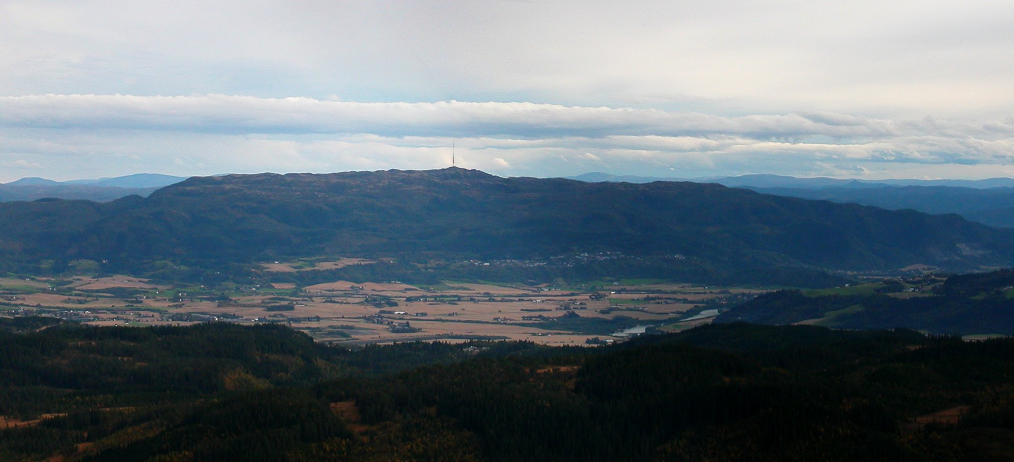 Vassfjellet seen from Storheia, Sør-Trøndelag, Norway